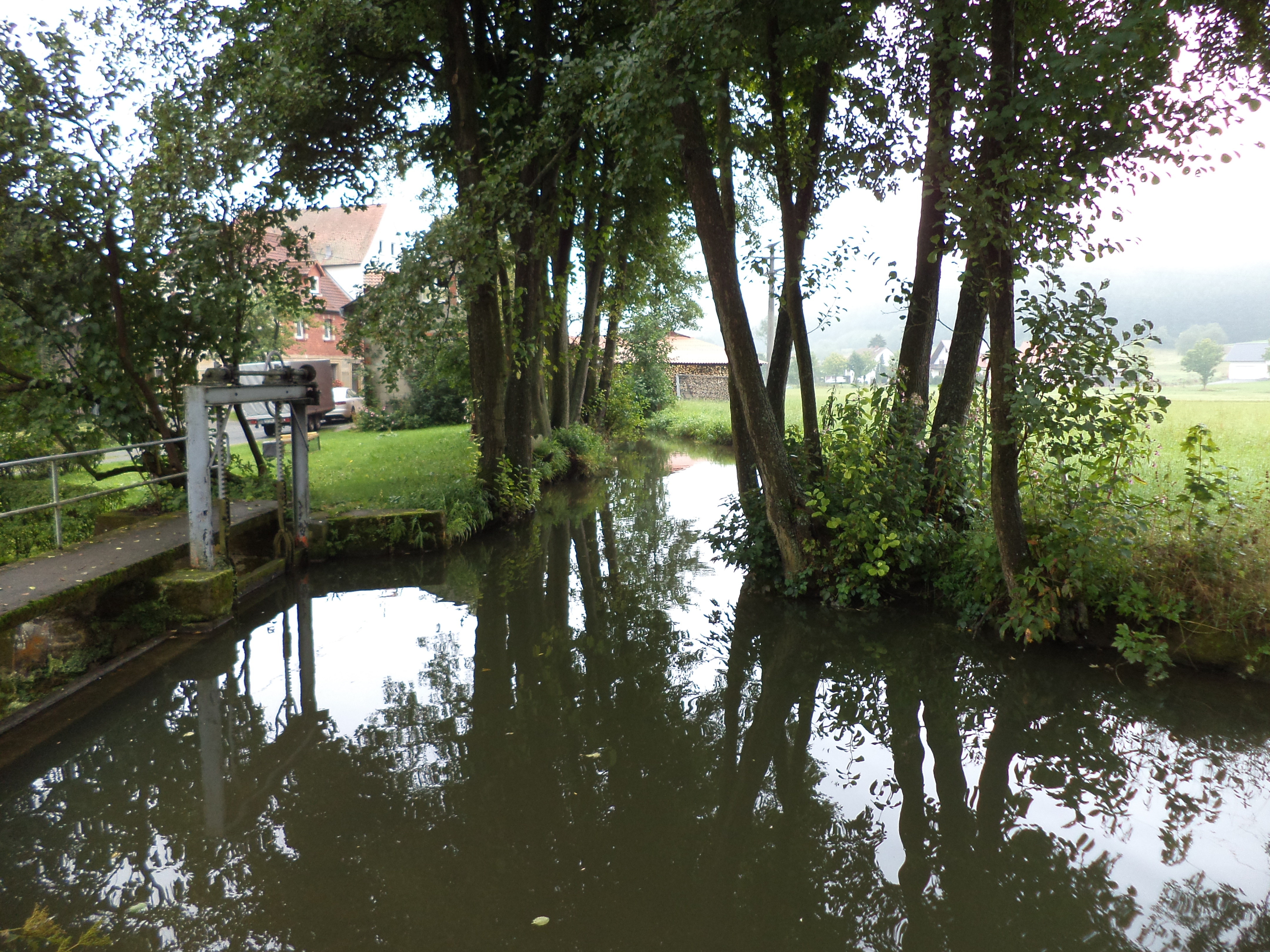 Der Friesenbach in Hutschdorf